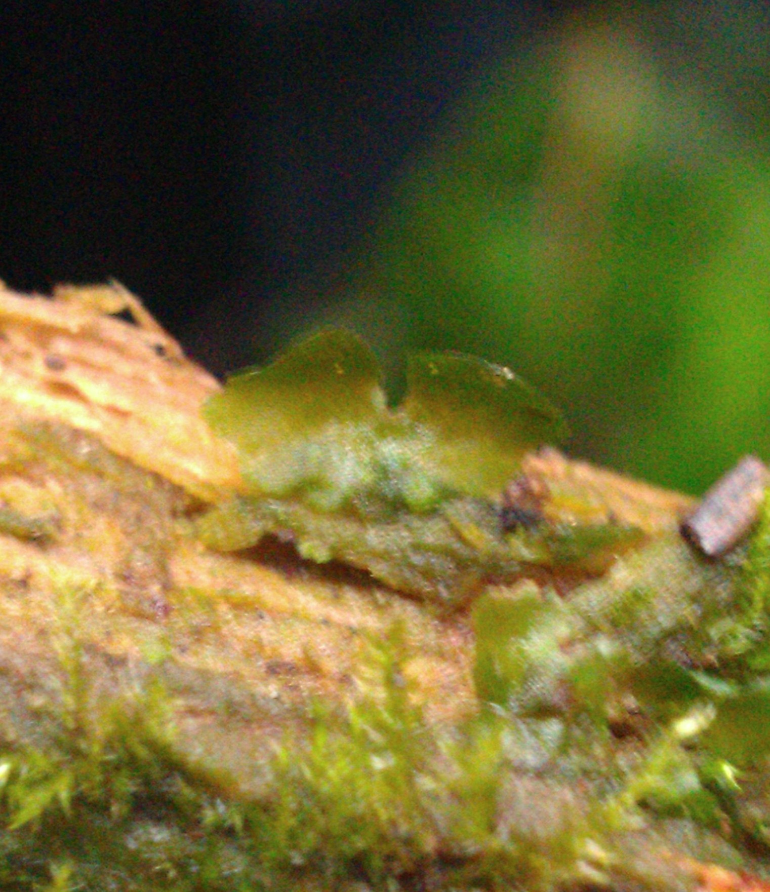 Le prothalle est haploïde (un seul jeu de chromosomes), on le reconnaît à sa forme cordée.